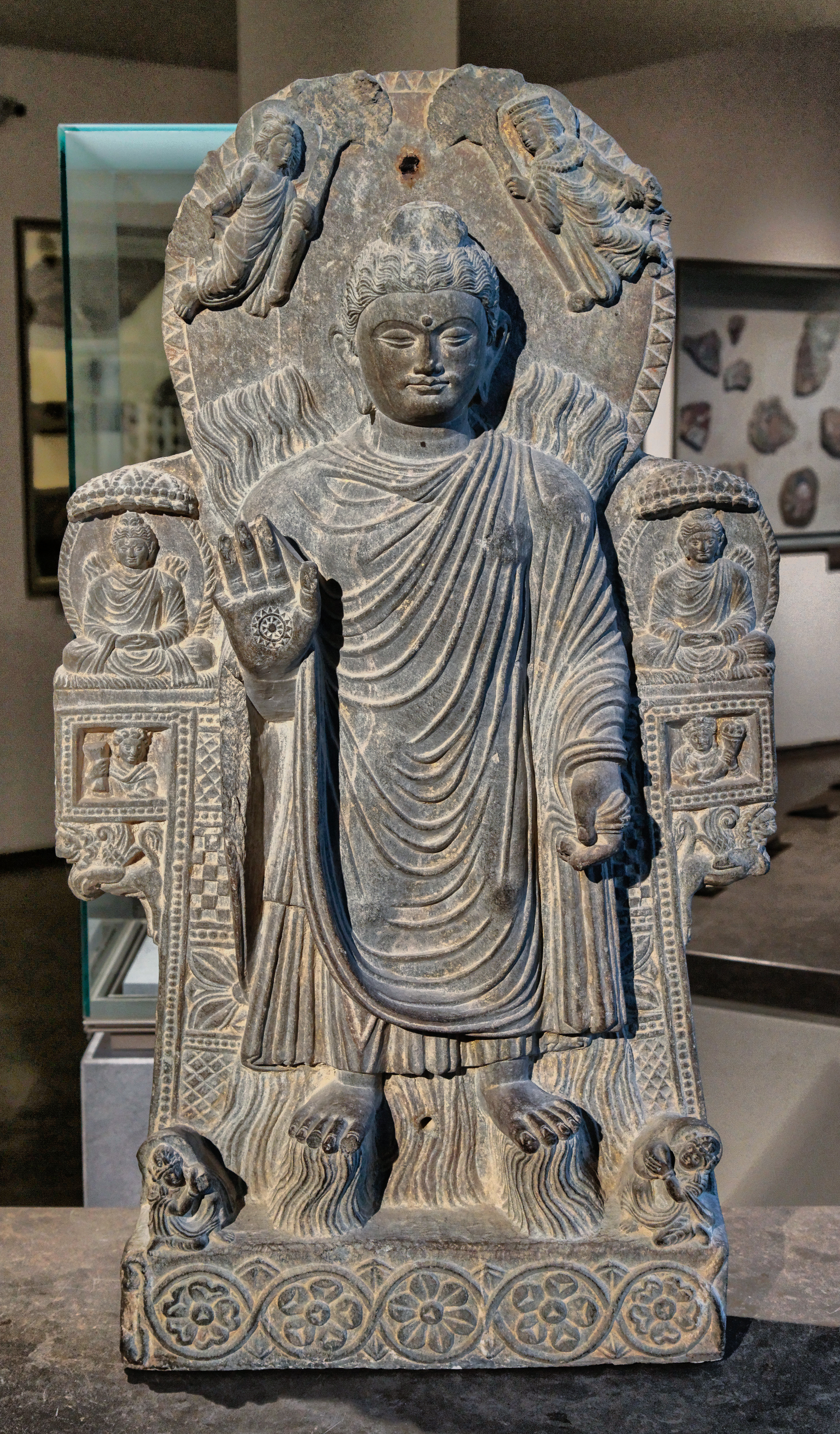 Le grand miracle de Sravasti ou le double miracle de l'eau et du feu (Le Buddha au Grand Miracle.). Afghanistan, région du Kapiça (Kâpîssâ), monastère de Paitava, IIIe siècle, schiste avec traces de dorures, H. 81 cm. Art du Gandhara propre à la région de Kaboul. Musée national des arts asiatiques - Guimet, Paris